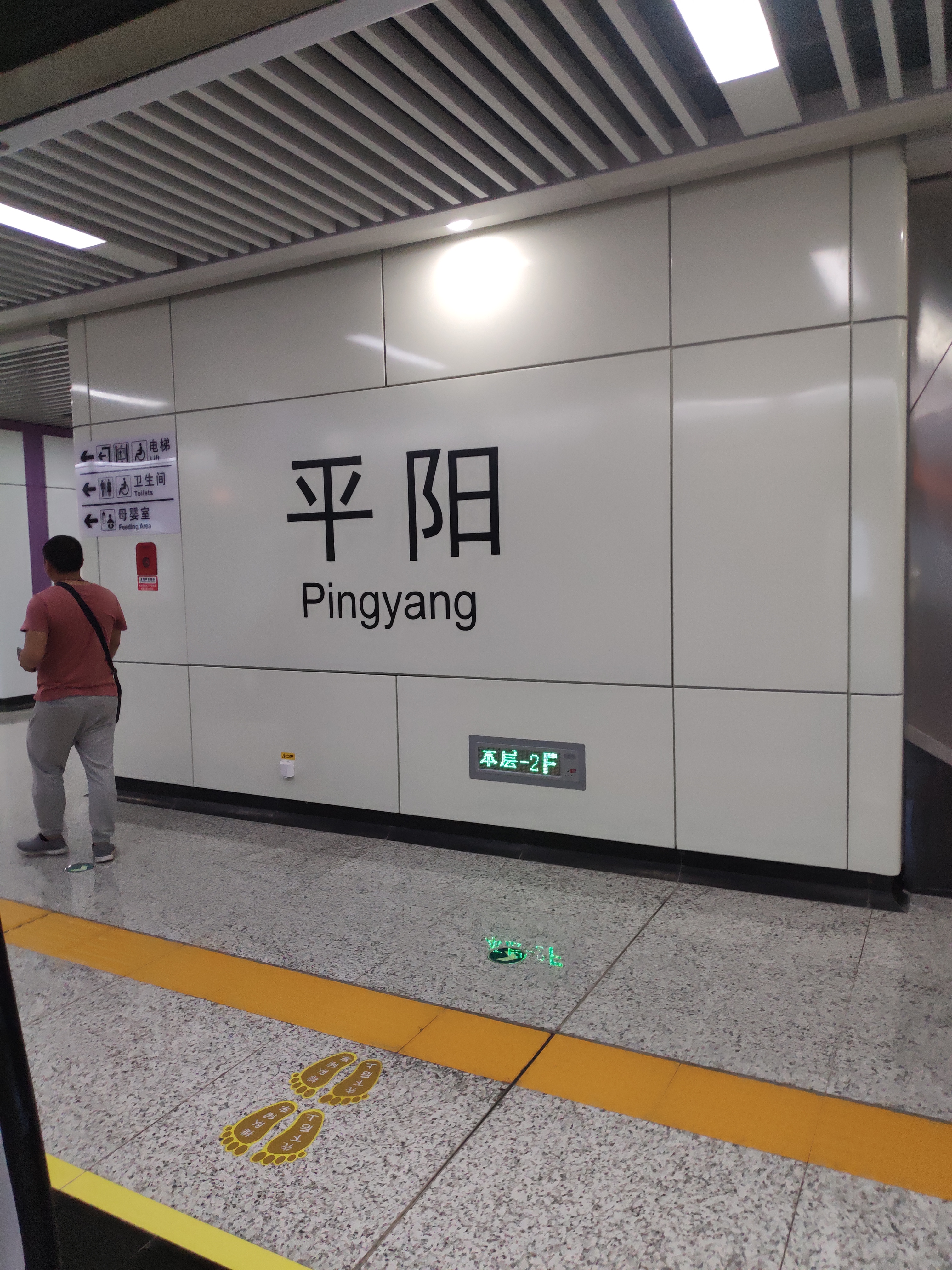 中文（香港）: 長沙地鐵4號線平陽站內標識